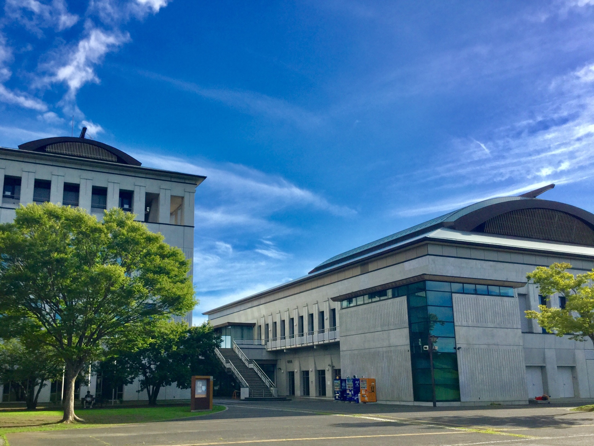 神奈川県にある寒川総合体育館